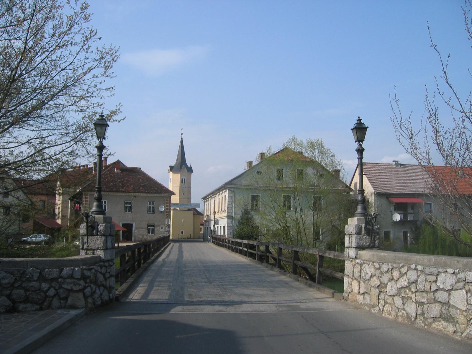 Kostanjevica na Krki, Slovenia photo:Ziga 07:46, 2 April 2007 (UTC)